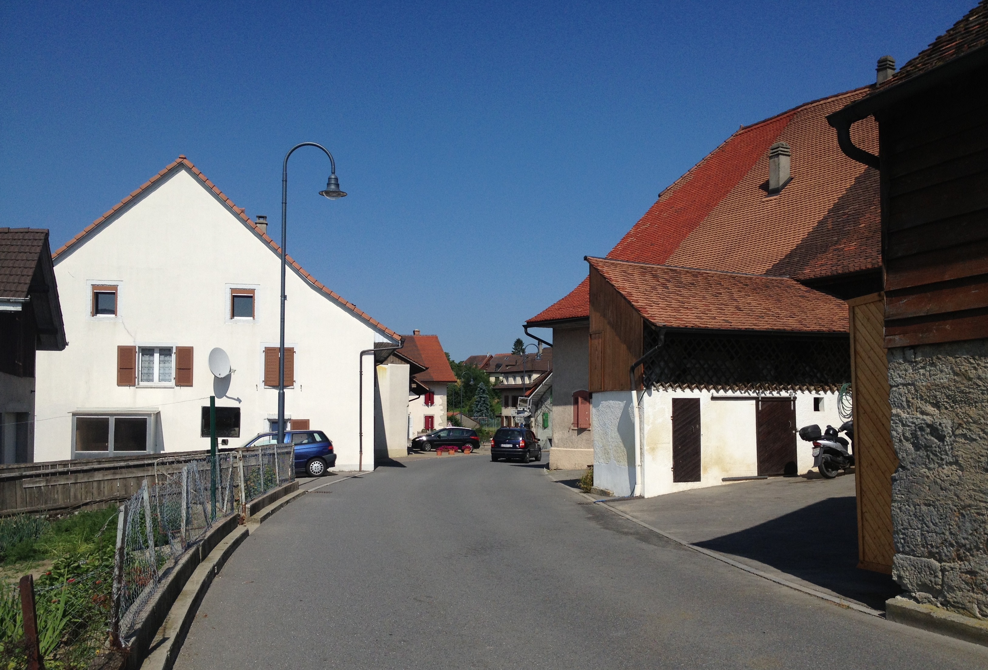 Châbles dans le canton de Fribourg en Suisse.